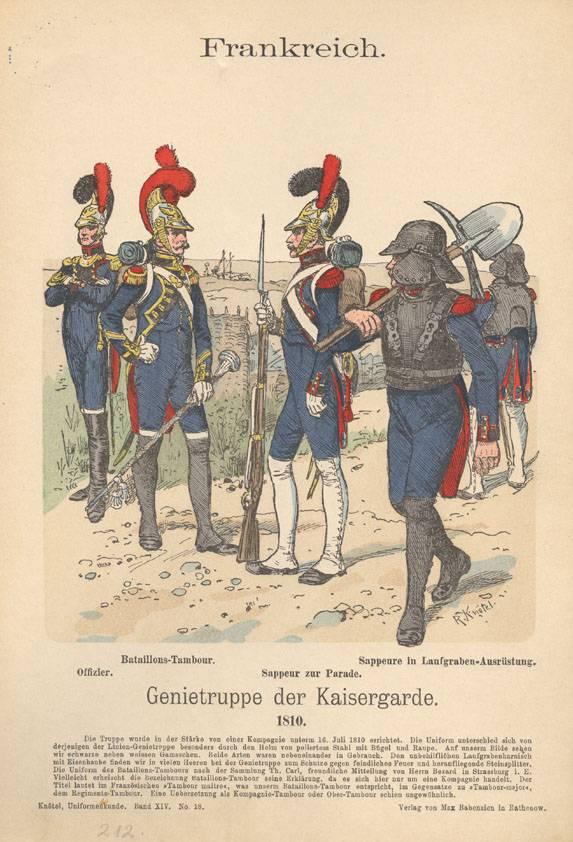 Illustration über die Genietruppe der französischen Kaisergarde im Jahre 1810.